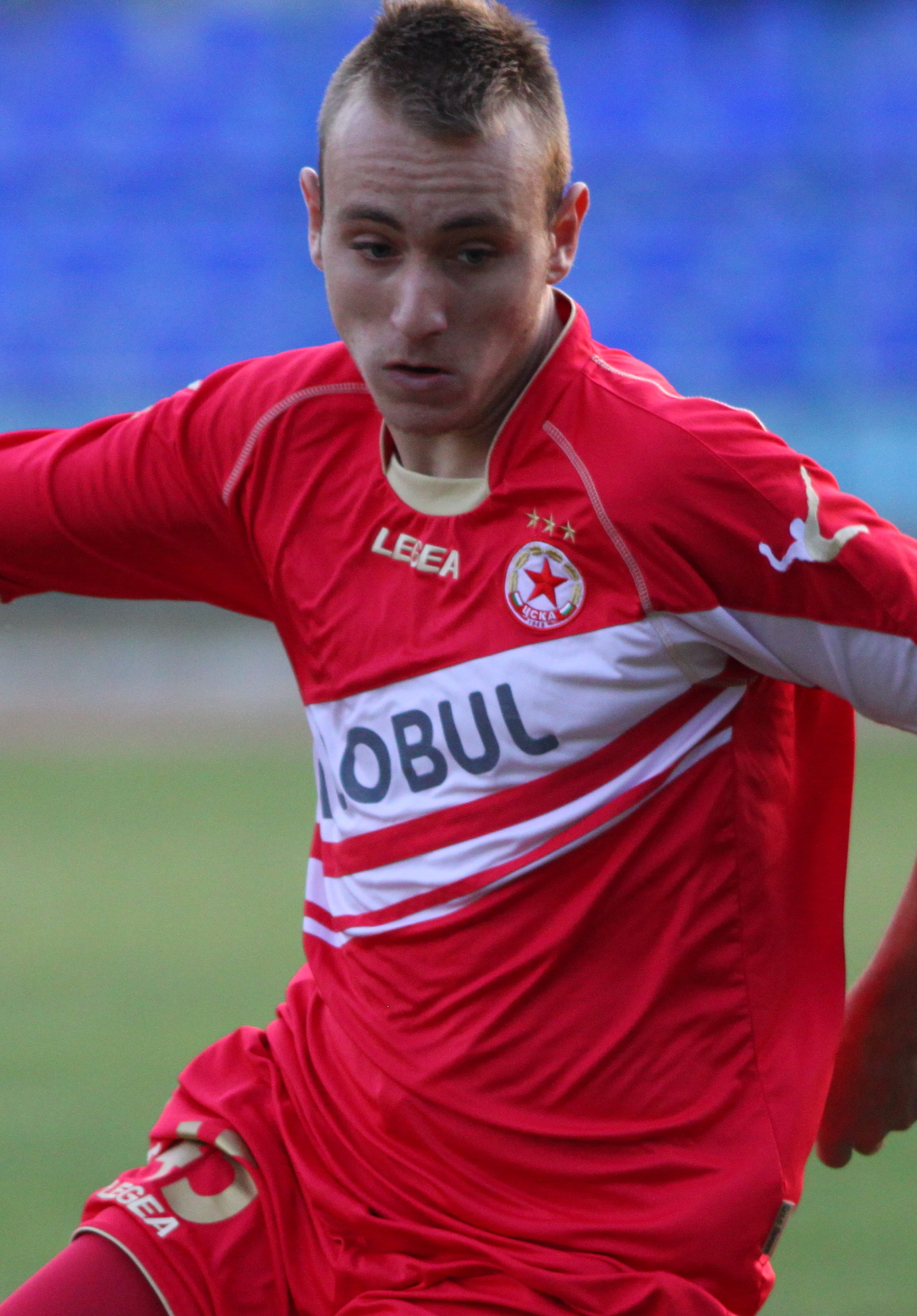 Григор Долапчиев - български футболист, състезател на ЦСКА София